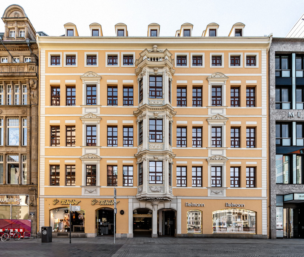 Ehemaliges Kauf- und Handelshaus